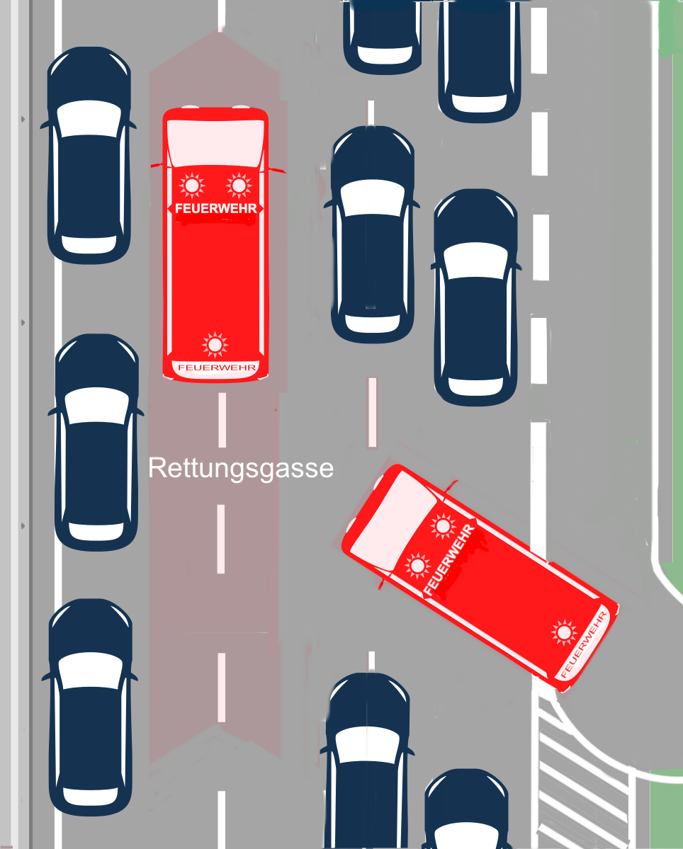 Freihalten der Einfahrspur in die Rettungsgasse in Deutschland